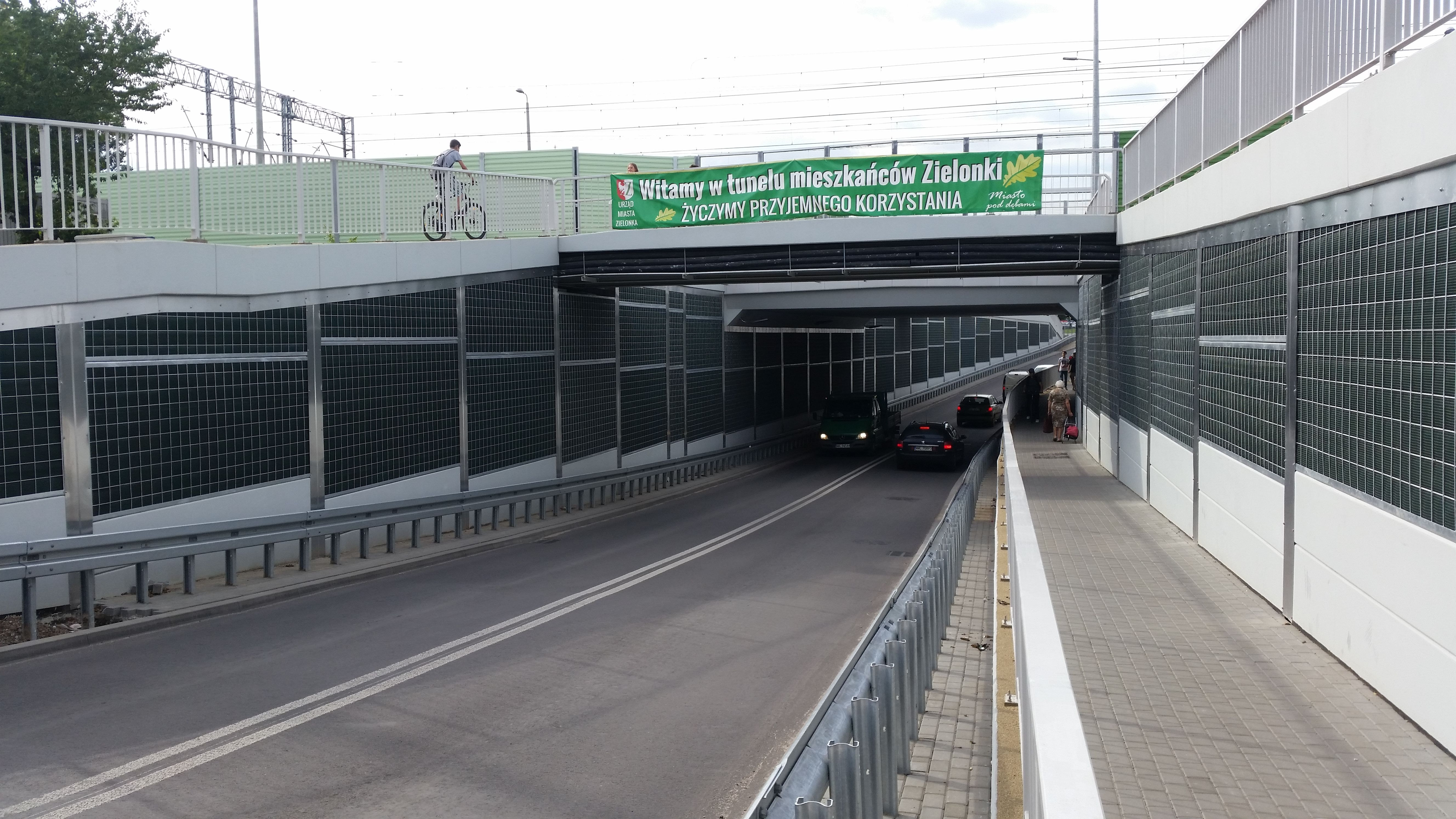 Tunel pod torami w Zielonce